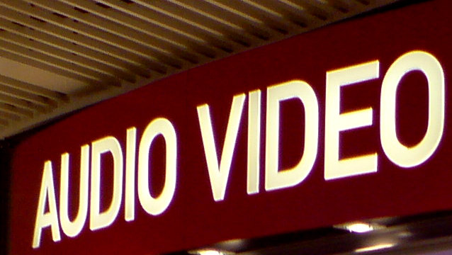 skylt